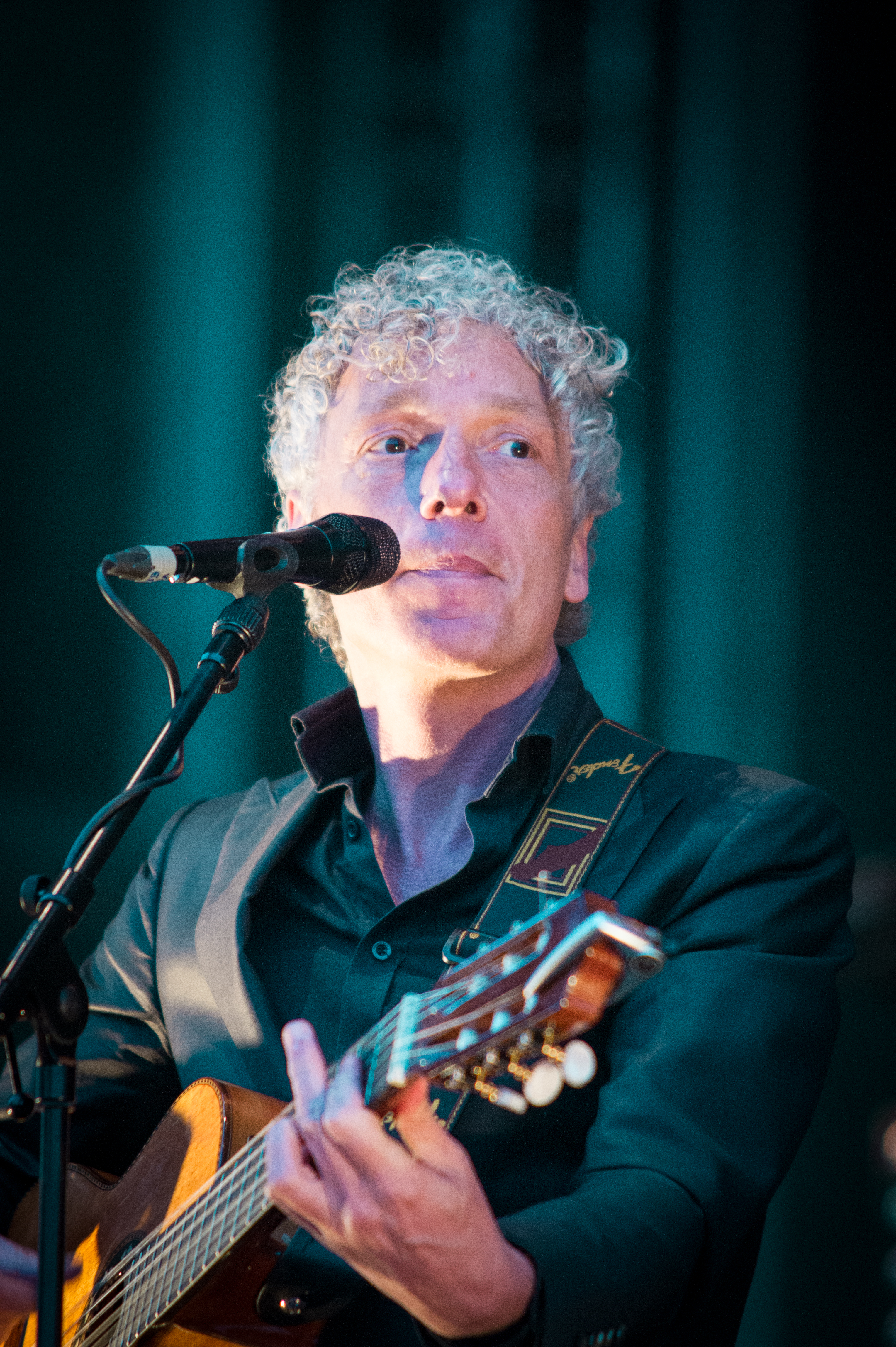 Spinvis (Erik de Jong) tijdens een openluchtconcert op de Grote Markt in Groningen